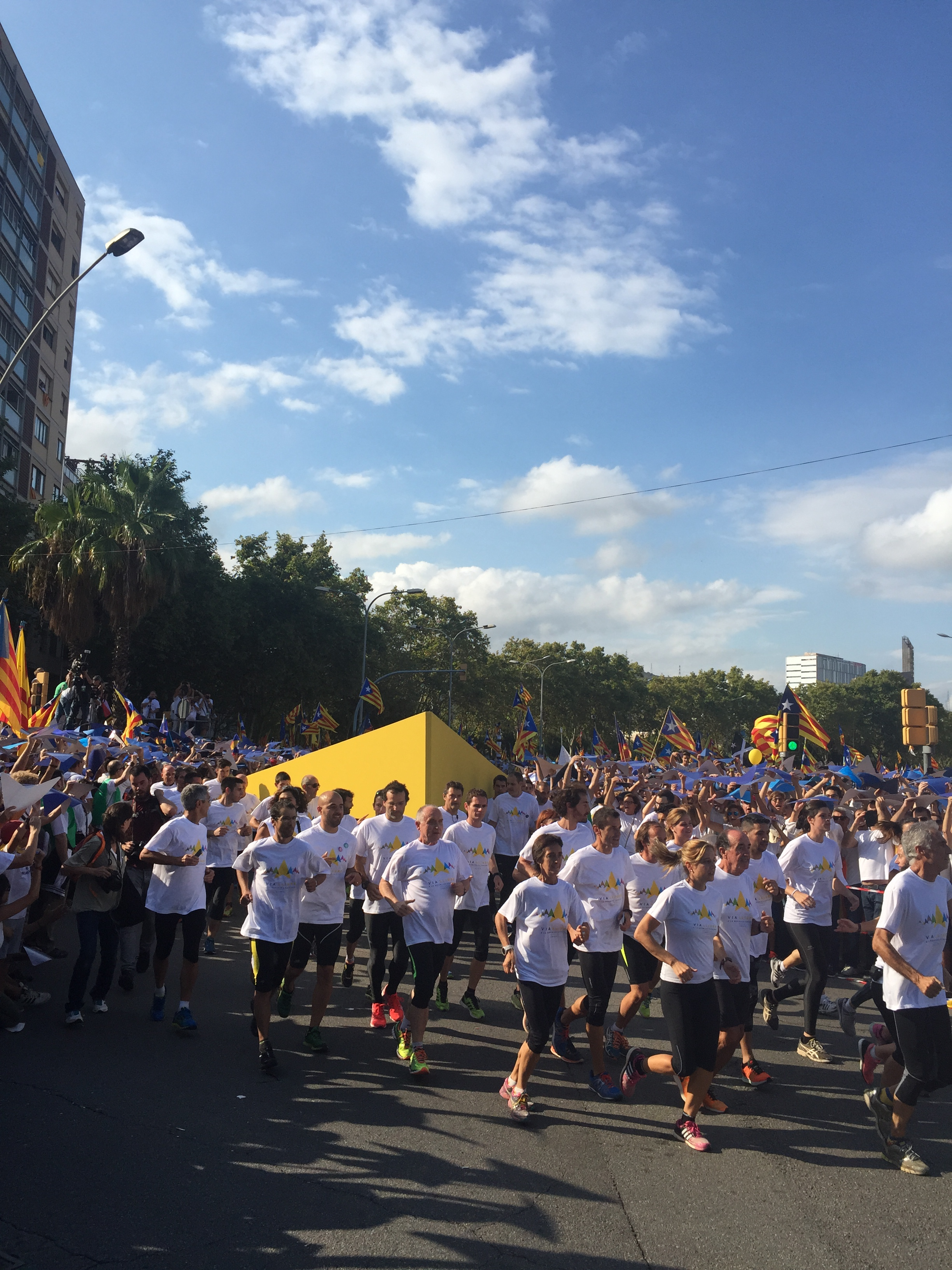 Pas del punter central al seu pas per l'estació de ferrocarril de Sant Andreu